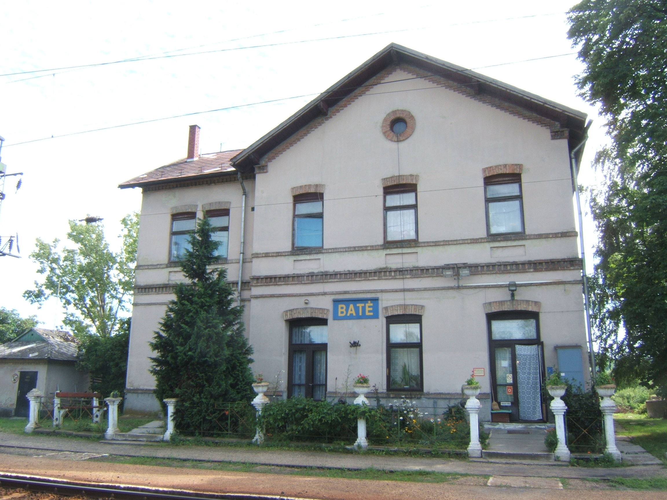 Baté vasútállomás